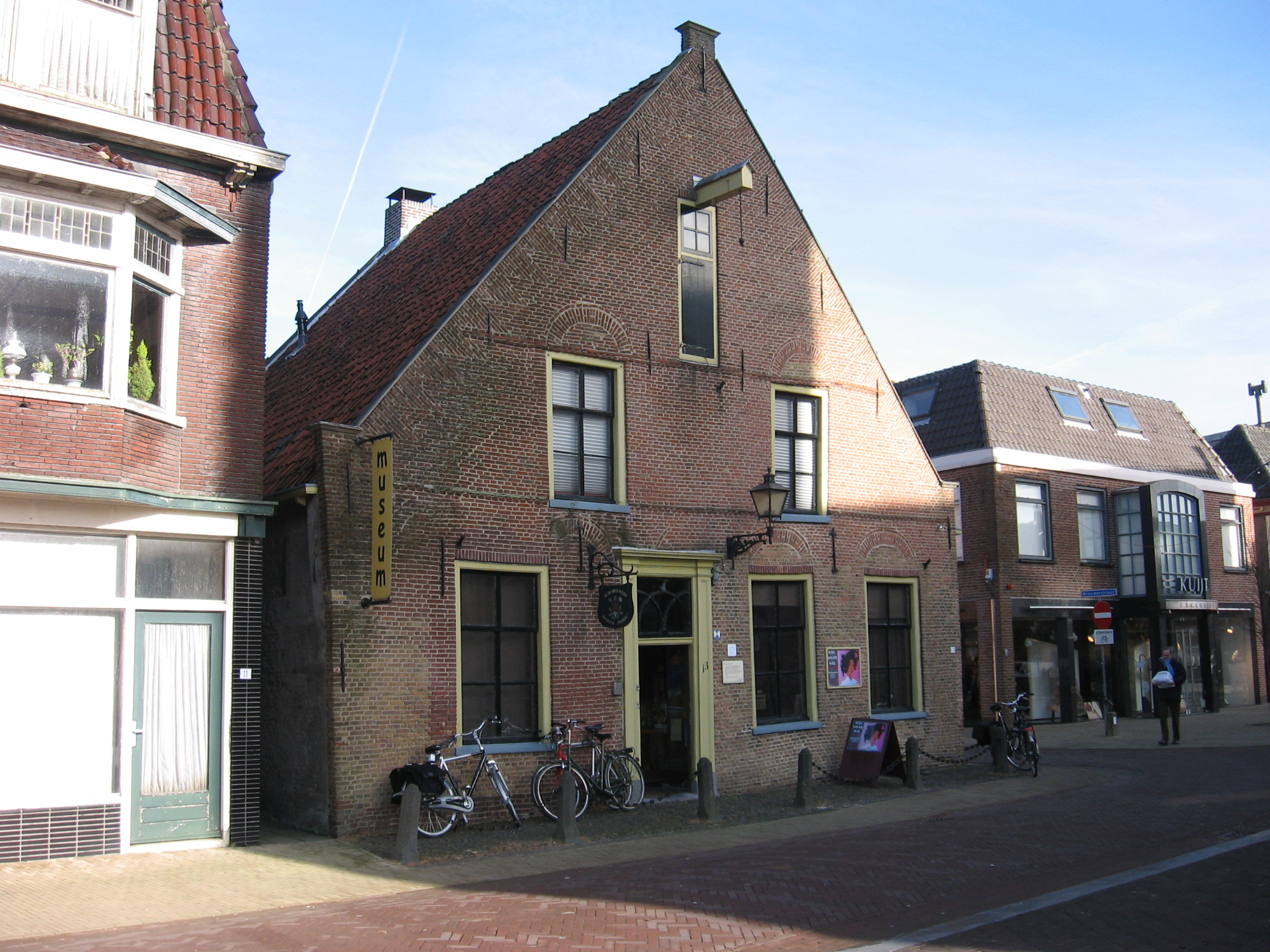 Barneveld